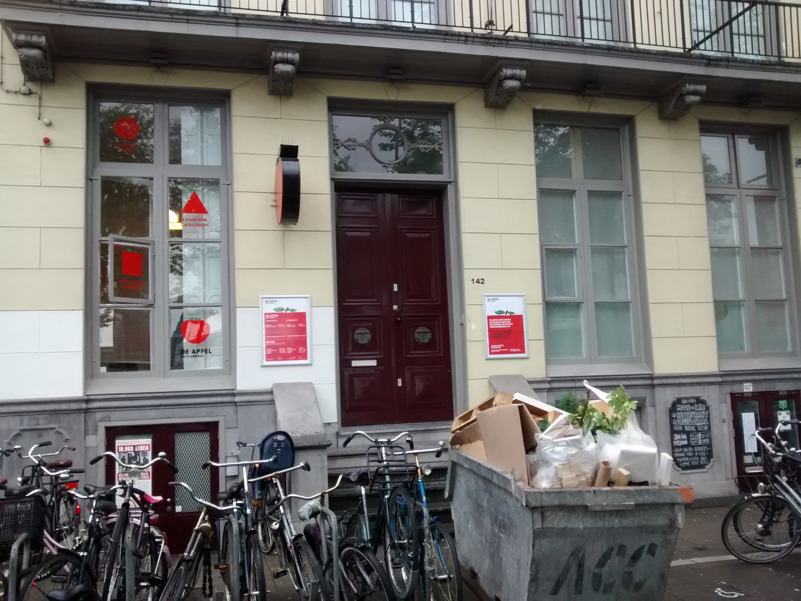 De Appel, Amsterdam. Hier vertrokken December 2016